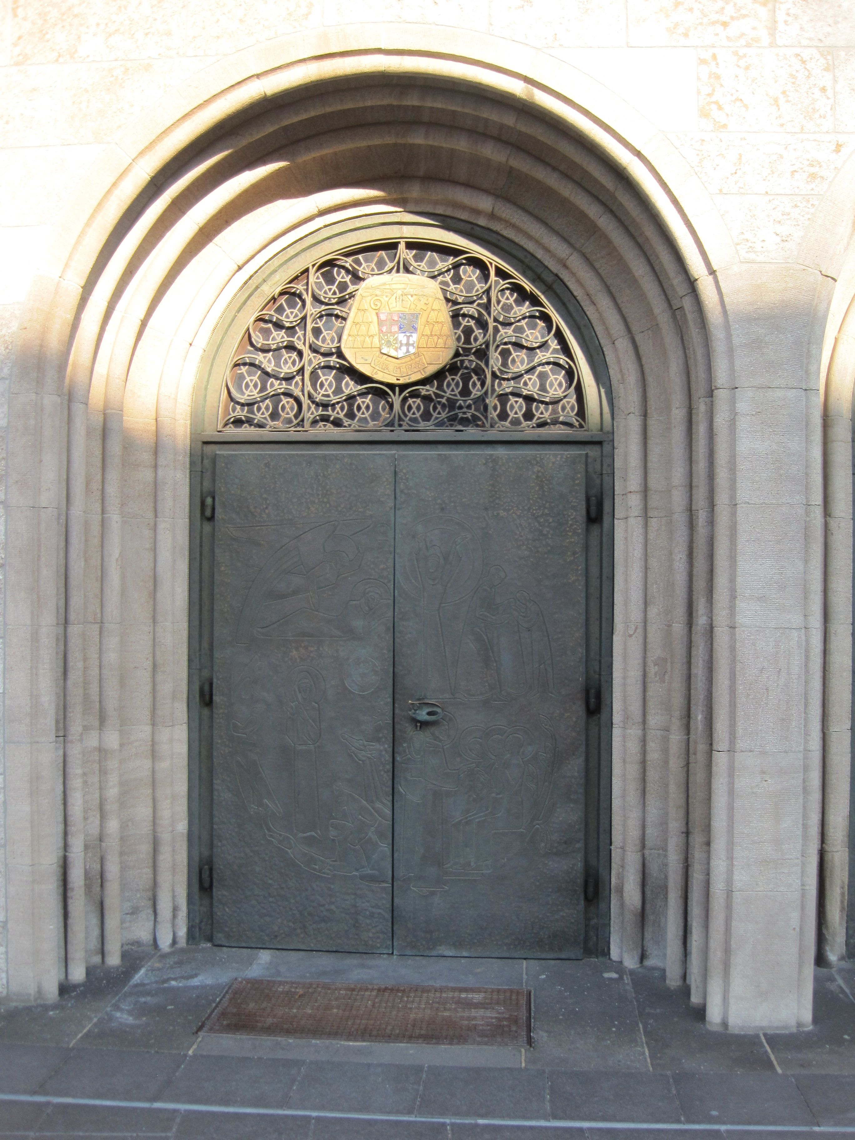 Das Foto zeigt das linke Eingangsportal zur St. Agnes-Kirche in Hamm.